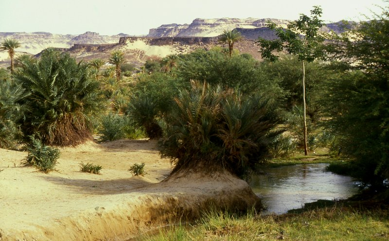 Palmengärten in der Oase Bilma, Kaouar-Tal in Niger